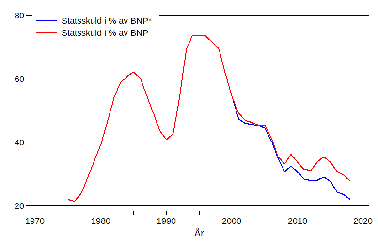 Svenska statsskulden i procent av BNP, uträknad av Riksgäldskontoret. = inklusive vidareutlåning och penningmarknadstillgångar.